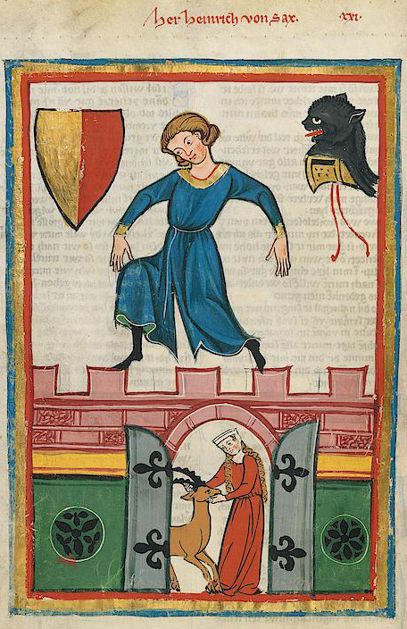 Minnesänger Heinrich II. von Sax (1235-1289) in der Manessischen Liederhandschrift, fol. 59v